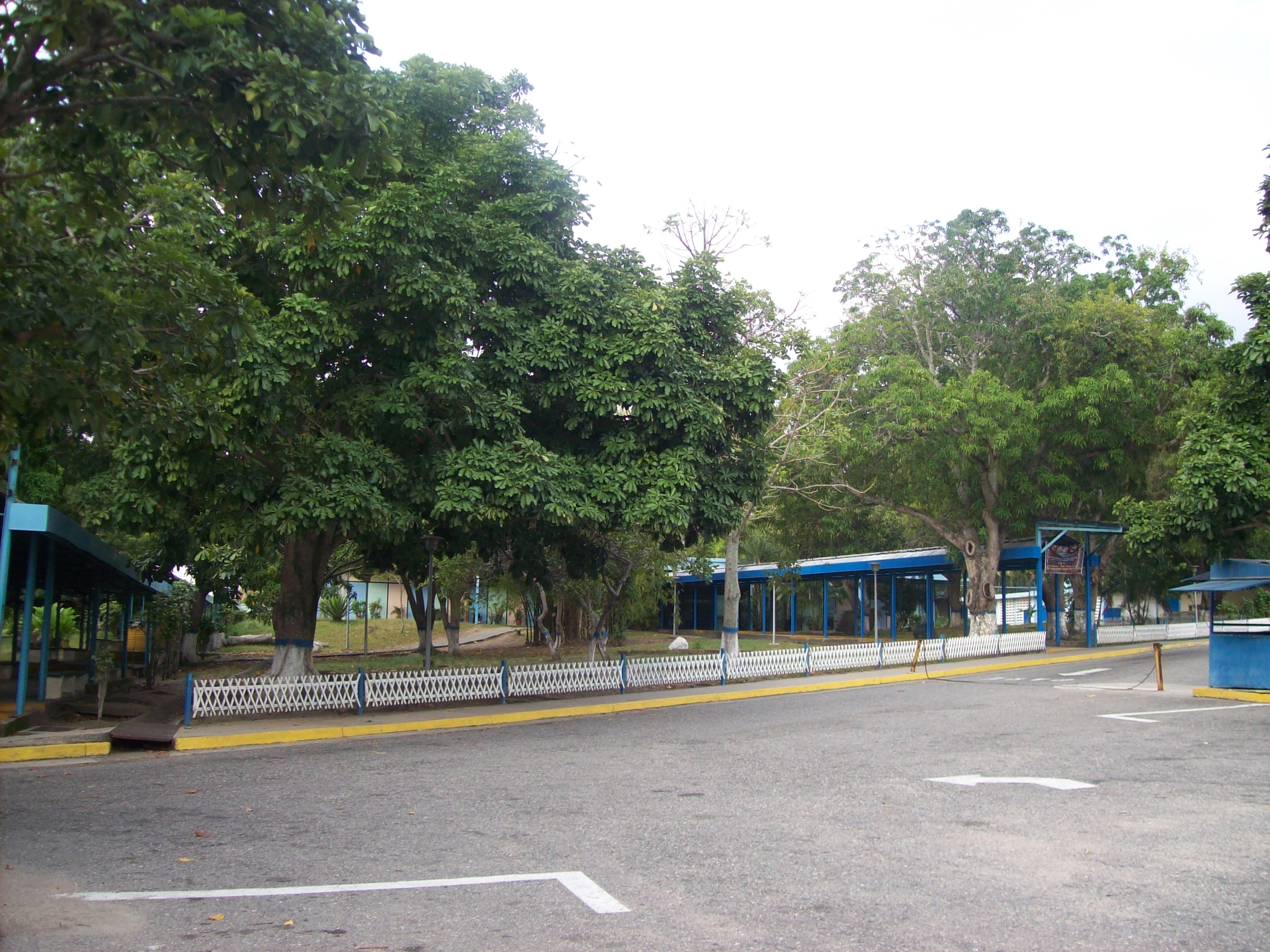 Tecnológico del Yaracuy IUTY